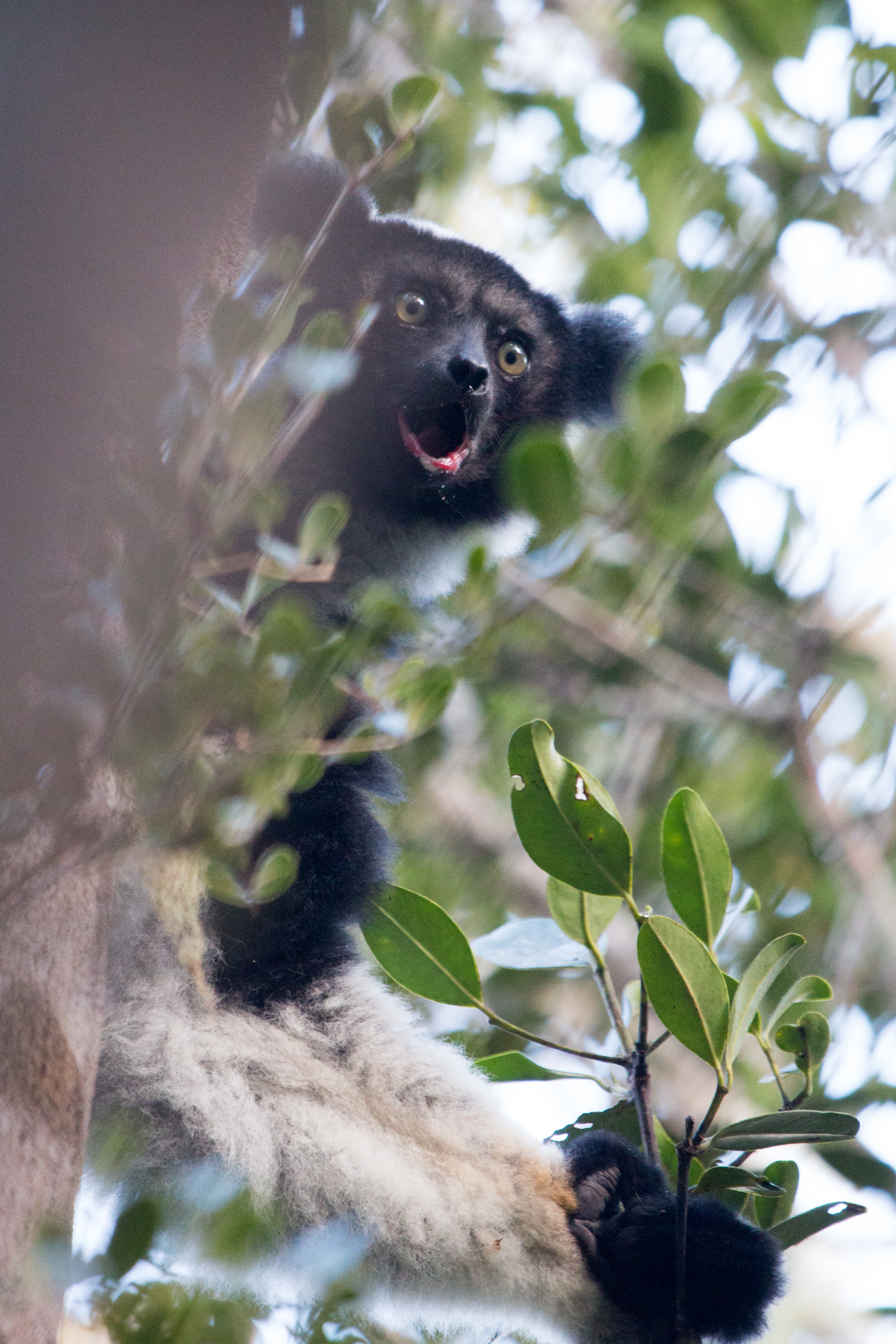 Indri indri au parc national d'Andasibe-Mantadia, dans l'est de Madagascar.